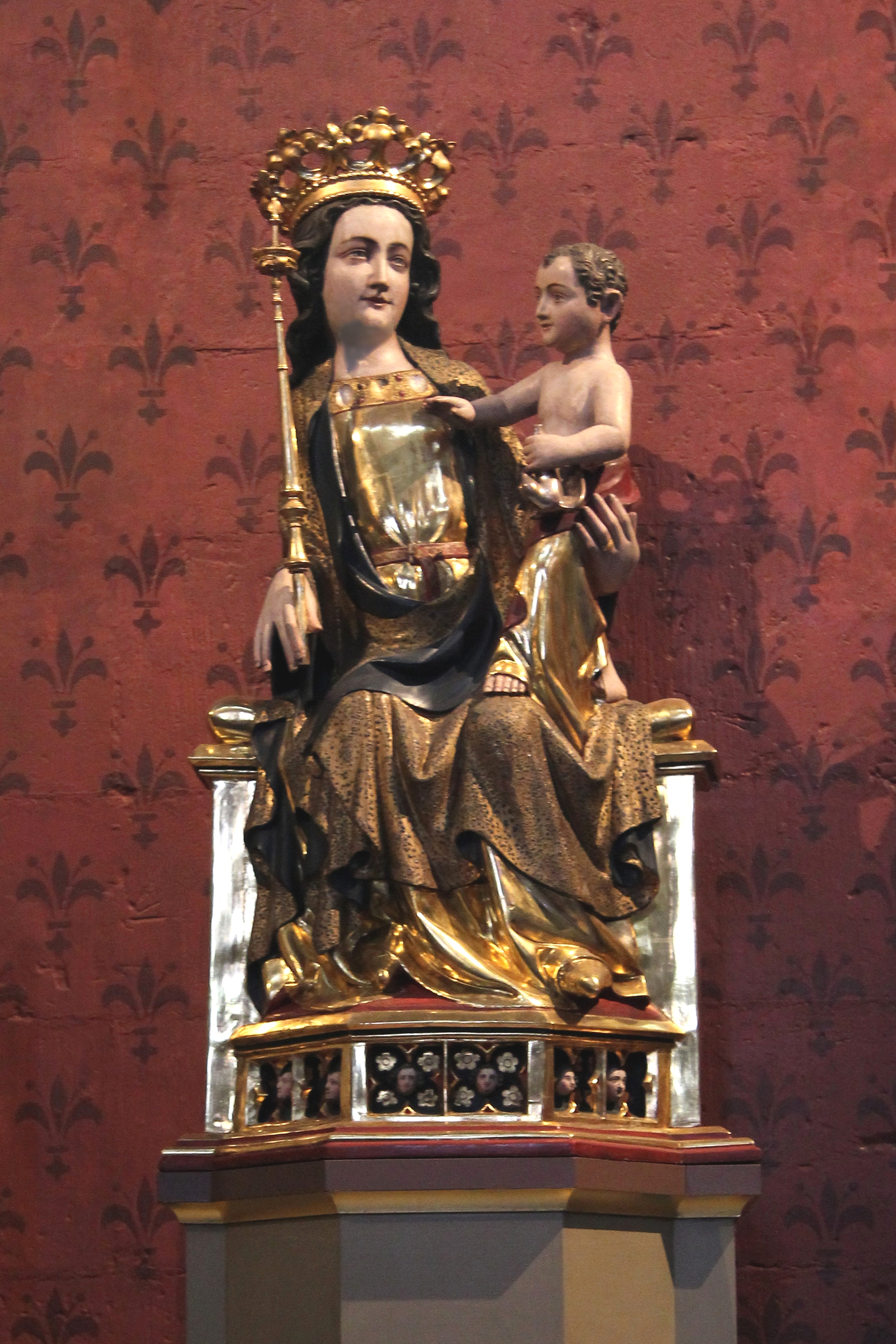 Thronende Madonna mit Kind, 14. Jh., ca. 98 cm hoch (ursprünglich kath. Kapelle Gimmingen an der Ahr)